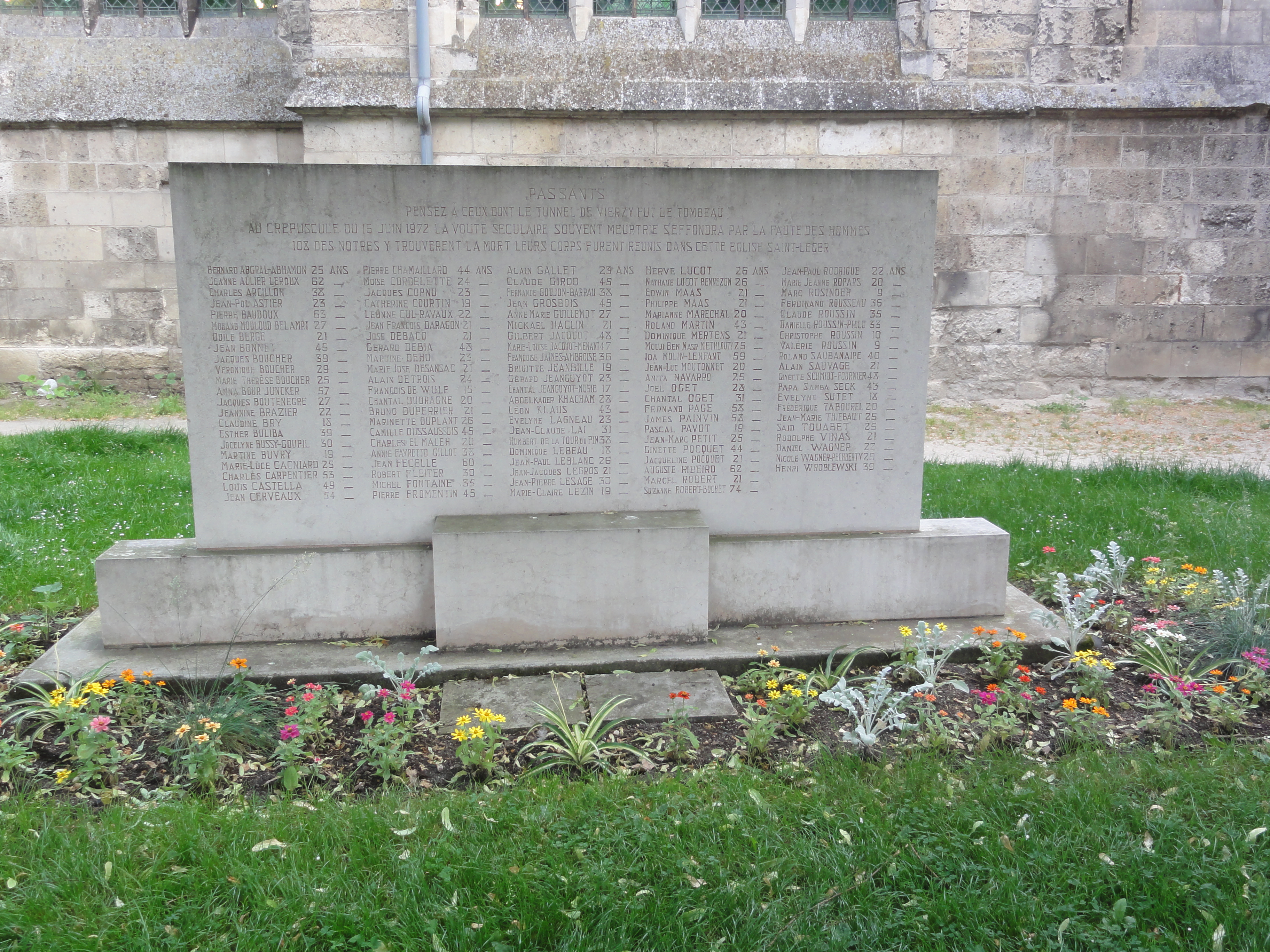 Soissons, mémorial de l'accident du tunnel de Vierzy. Monument en souvenir des victimes de l'effondrement du tunnel survenu le 16 juin 1972. Ce monument se trouve à côté de l'église Saint-Léger de Soissons.